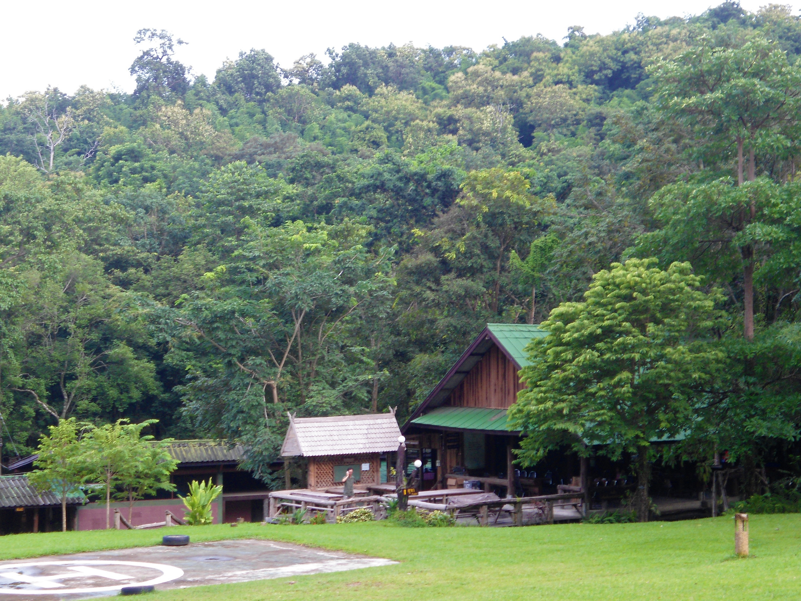 ร้านค้าสวัสดิการ บริเวณที่ทำการอุทยานแห่งชาติแม่วงก์ อำเภอปางศิลาทอง จังหวัดกำแพงเพชร